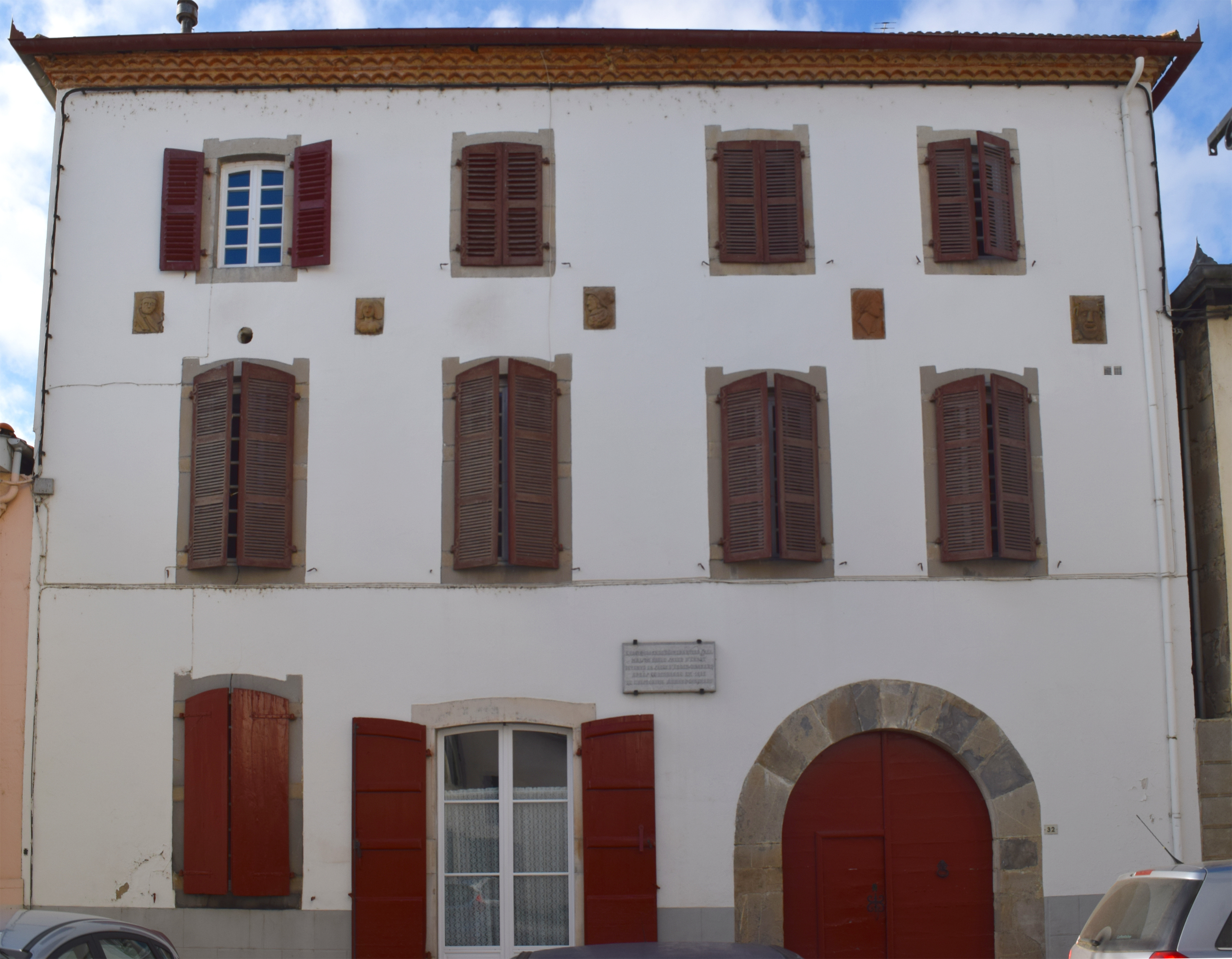 Maison noble Derdoy-Oyhenart